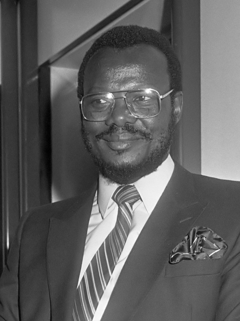 Aankomst op Schiphol van Chief Mangosuthu Gatsha Buthelezi, leider van Zoeloeland (Zuid-Afrika) en voorzitter van de Inkatha Vrijheidspartij 10 juni 1983